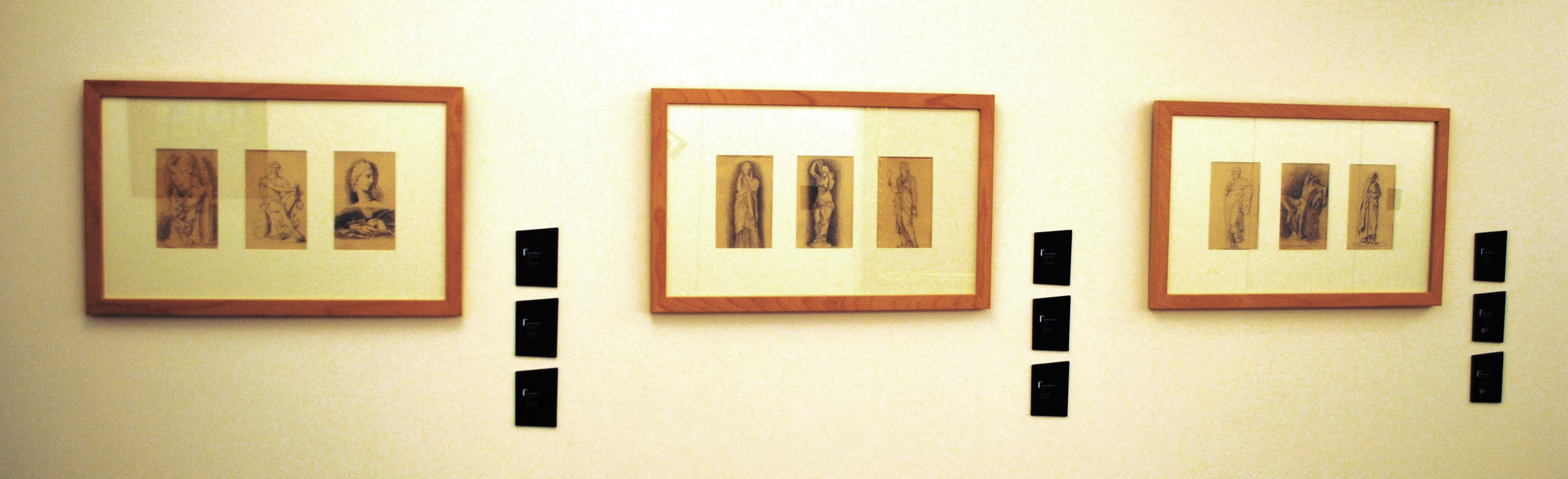 Vexa o título e as categorías.